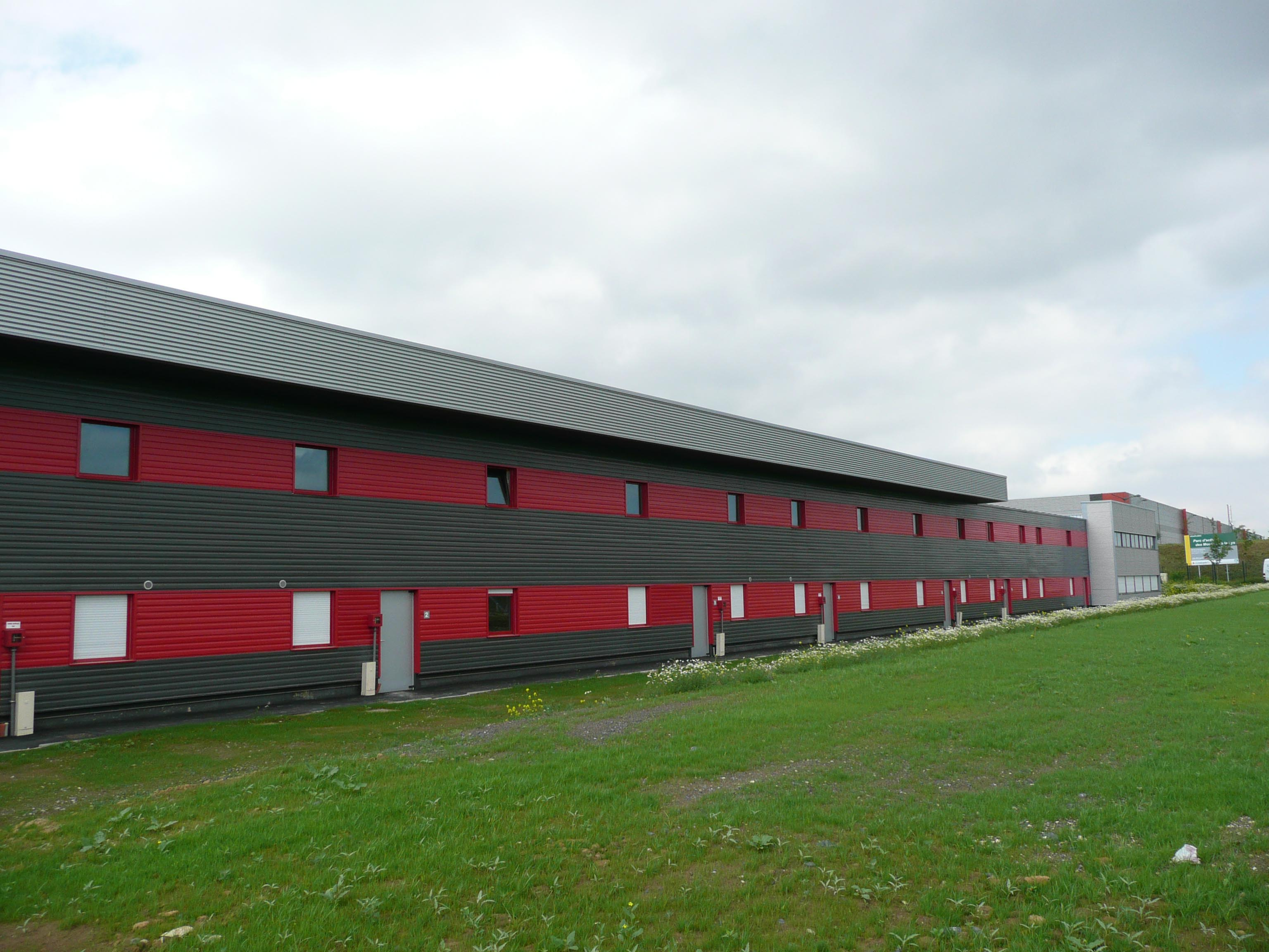 L'Hôtel d'entreprise d'Houplines